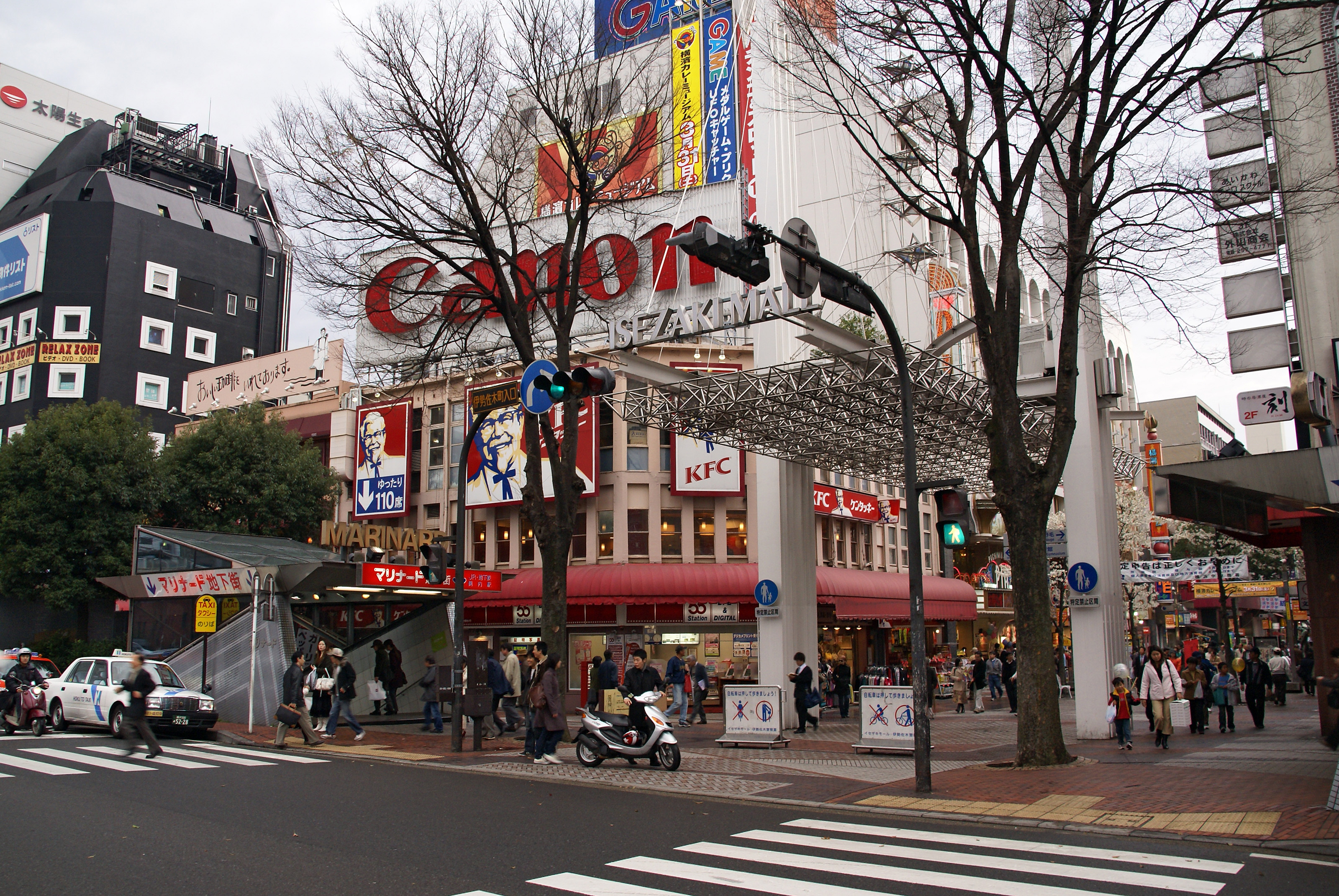 Isezaki mall in Yokohama, Japan